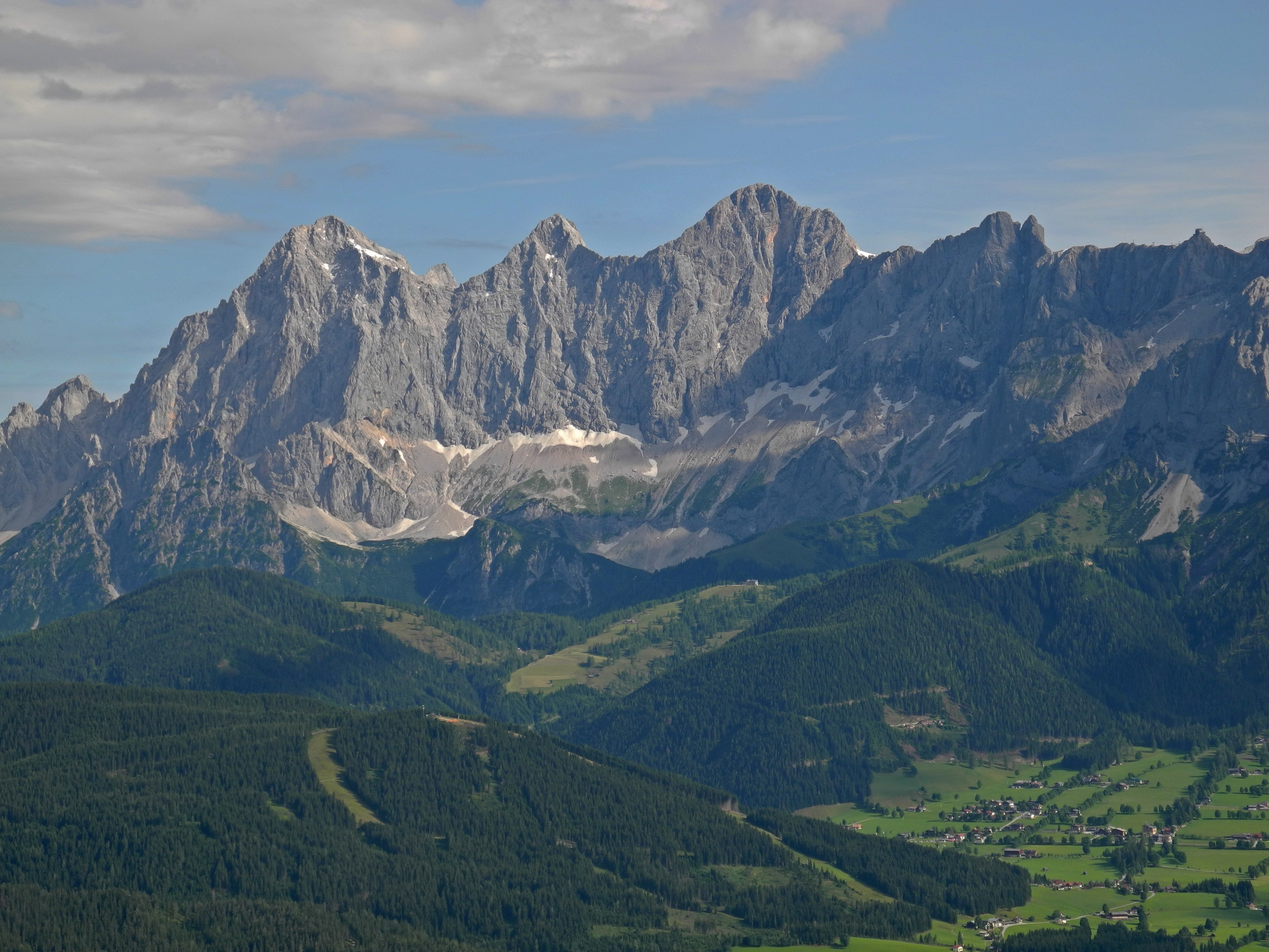 Blick von der Hochwurzen zum Dachsteinmassiv mit der Dachsteinsüdwand This media shows the natural monument in Styria with the ID 783.